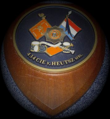 Wapenschildje 434 InfBevCie Mobiel RvH